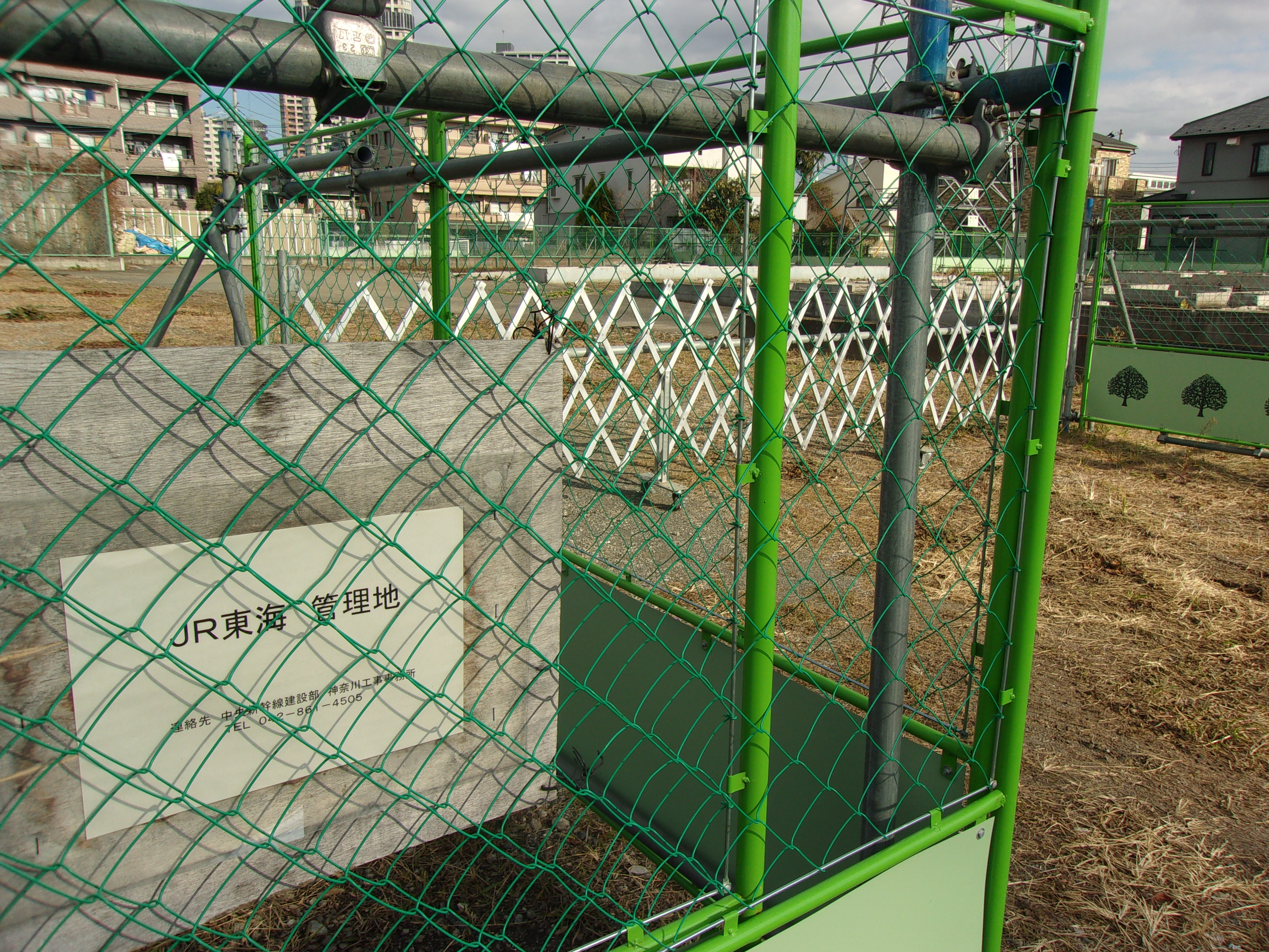 リニア中央新幹線神奈川県駅建設予定地のJR東海取得管理用地